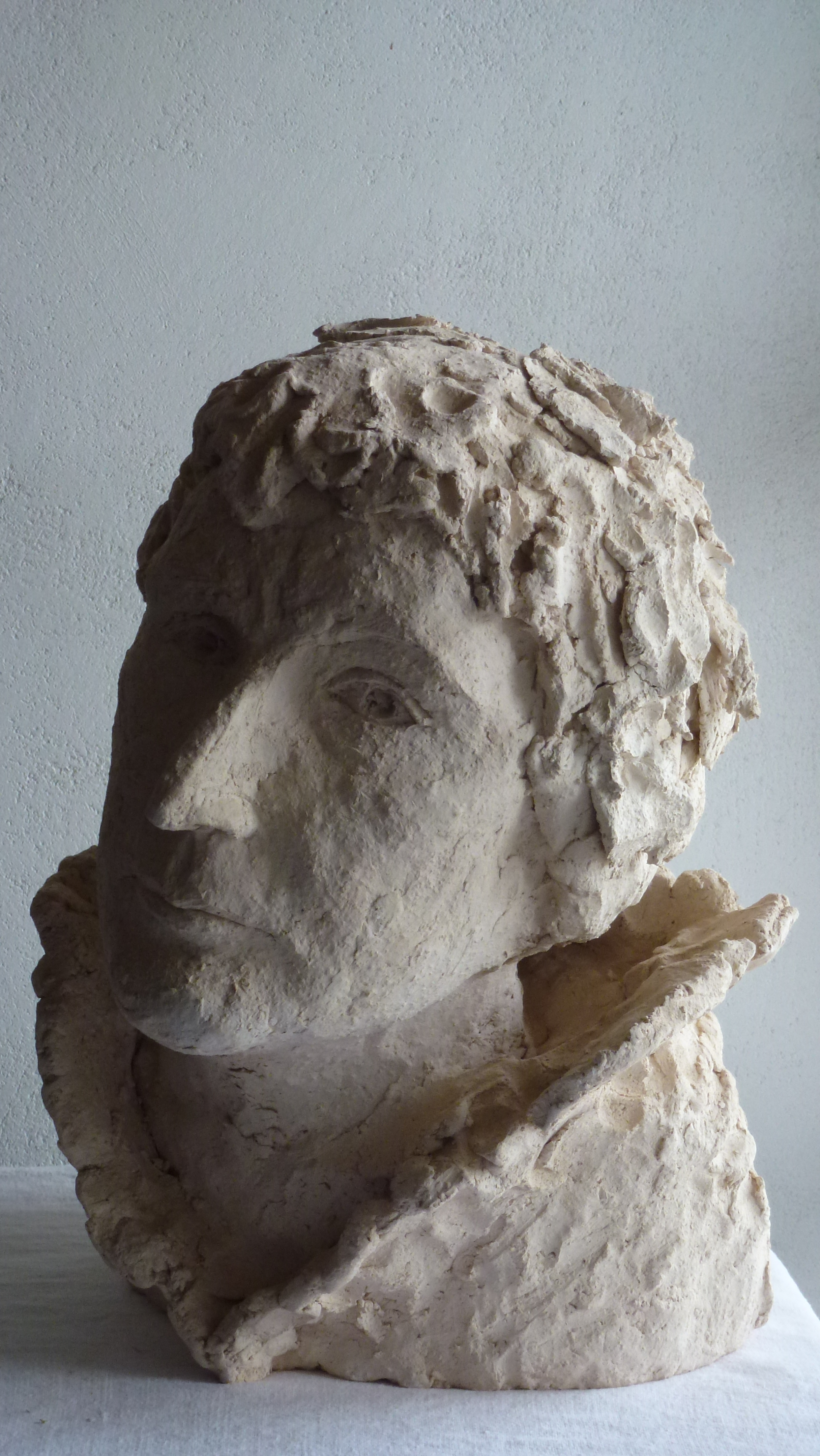 Buste de Germaine Richier. Sculpture de Délie Duparc. Terre cuite.